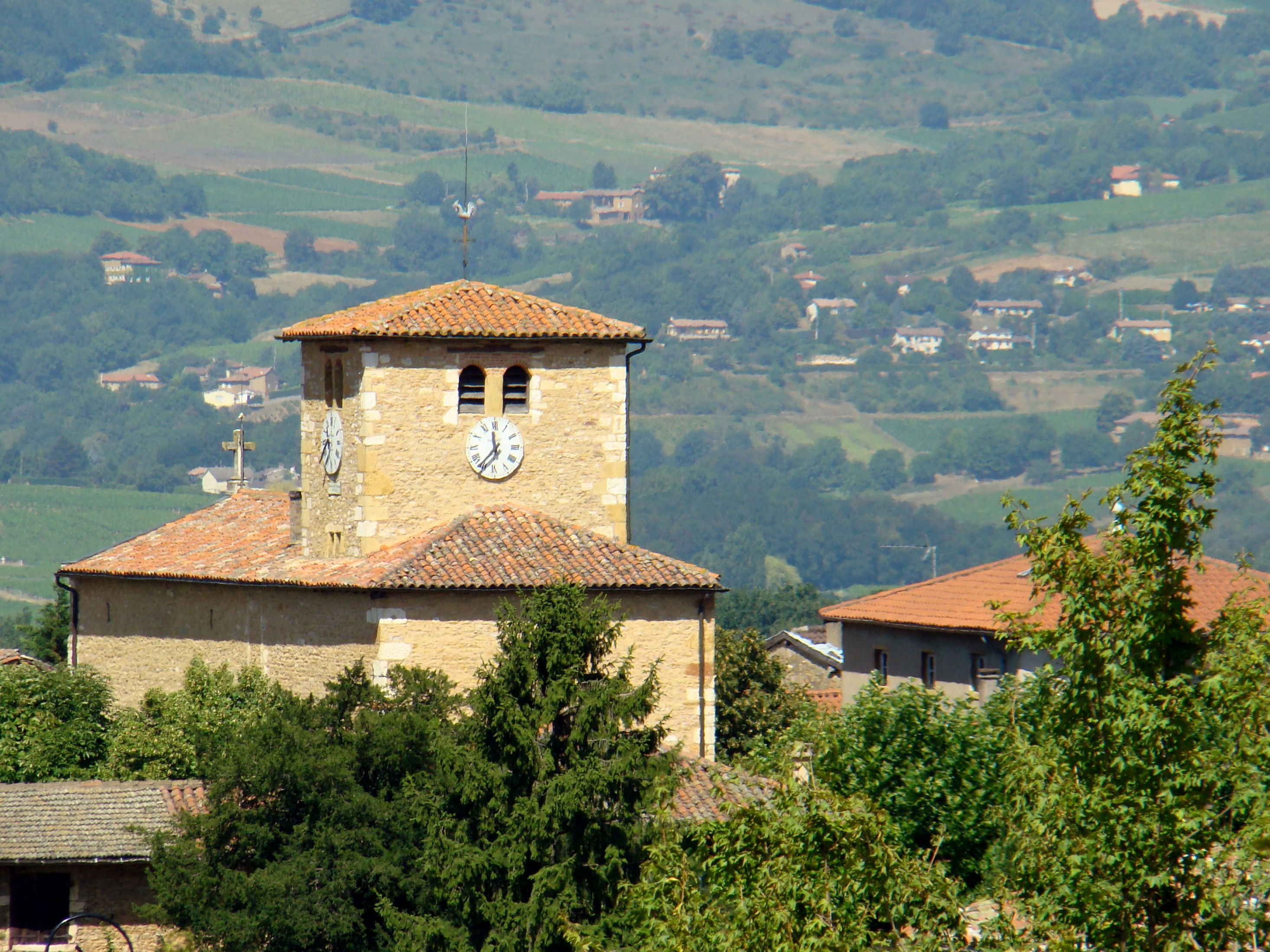 Eglise de Marcy